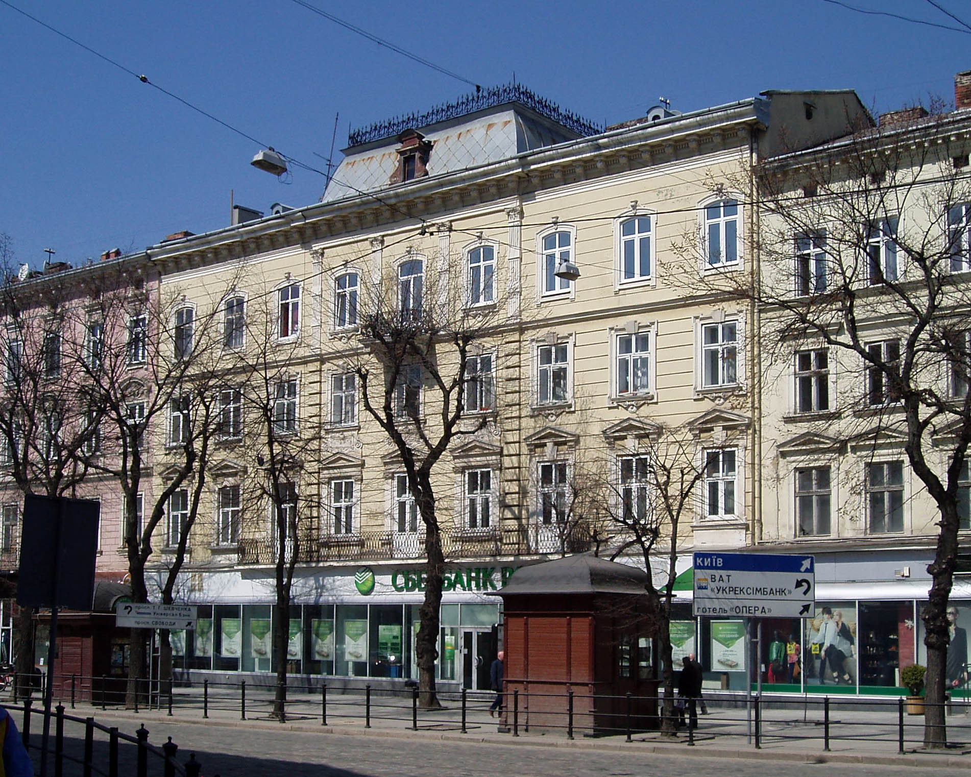 Будинок № 4 на вулиці Валовій у Львові